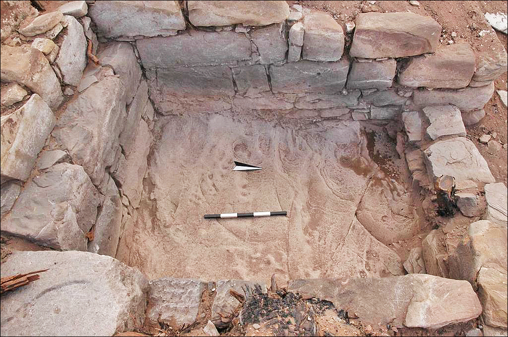 Thermes de Biyarah. Grand bassin de bain en pierre.